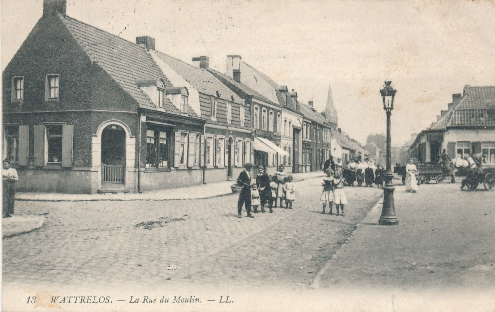 La rue du Moulin à Wattrelos (Nord), juste avant la guerre de 1914-1918. CPA.